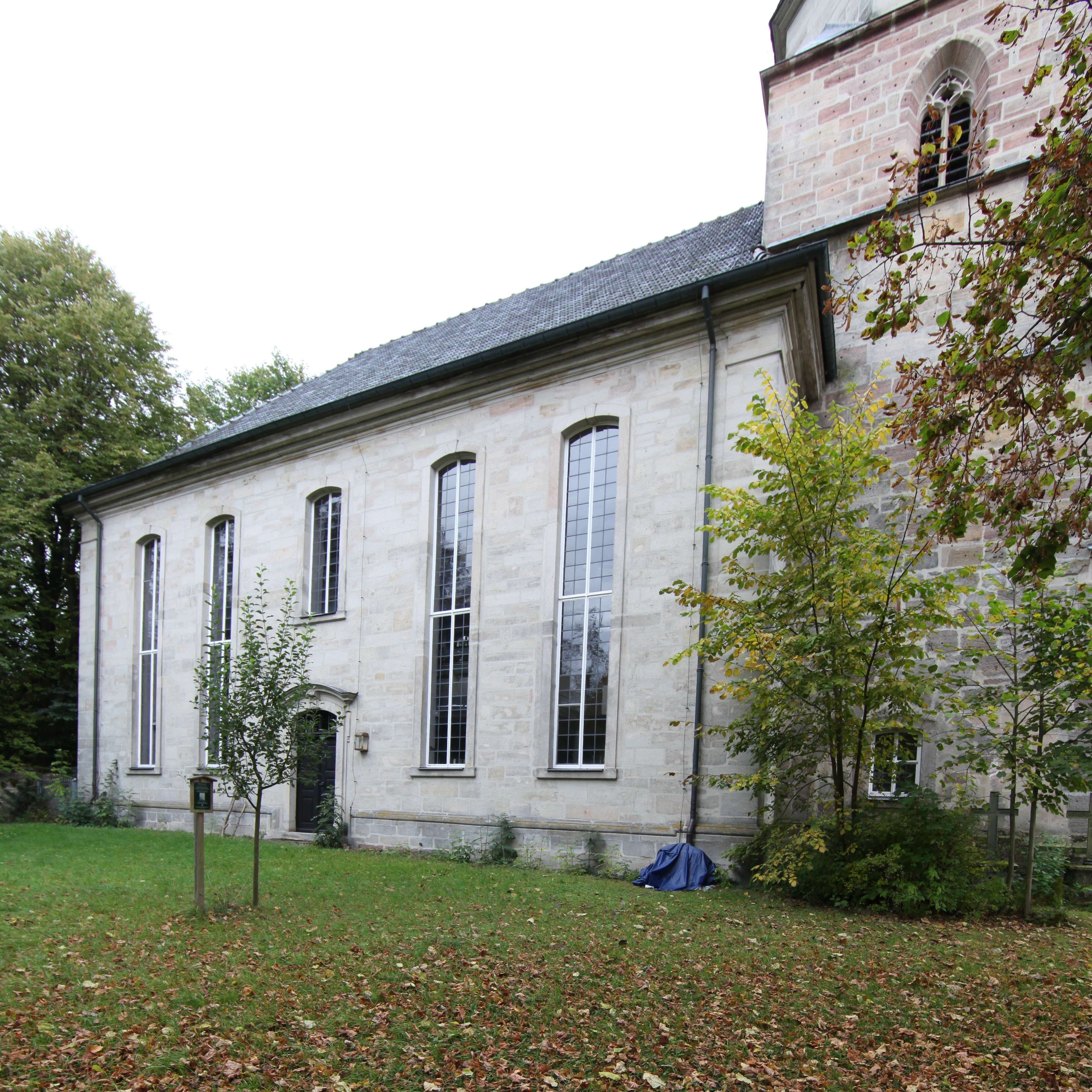 Evangelisch-lutherische Dreifaltigkeitskirche in Weißenbrunn vorm Wald